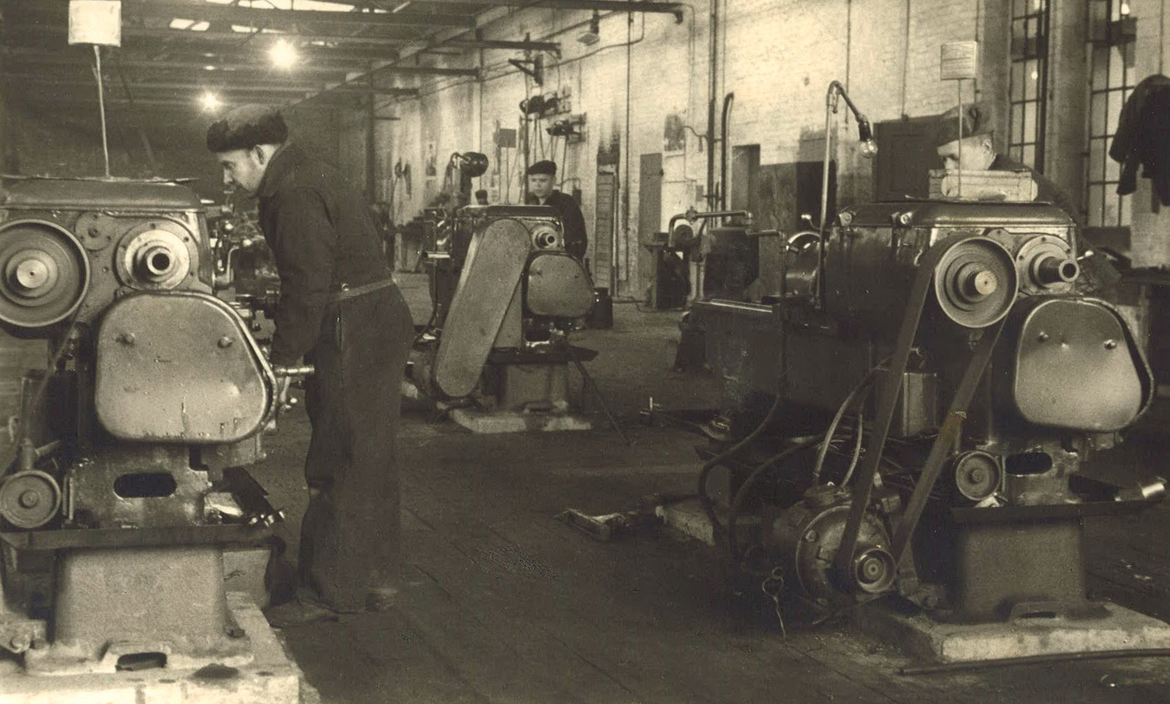 Ремонтно-механический завод Калининградского янтарного комбината после восстановления (после 1947 года).